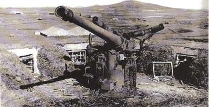 미군에 의해 폐기